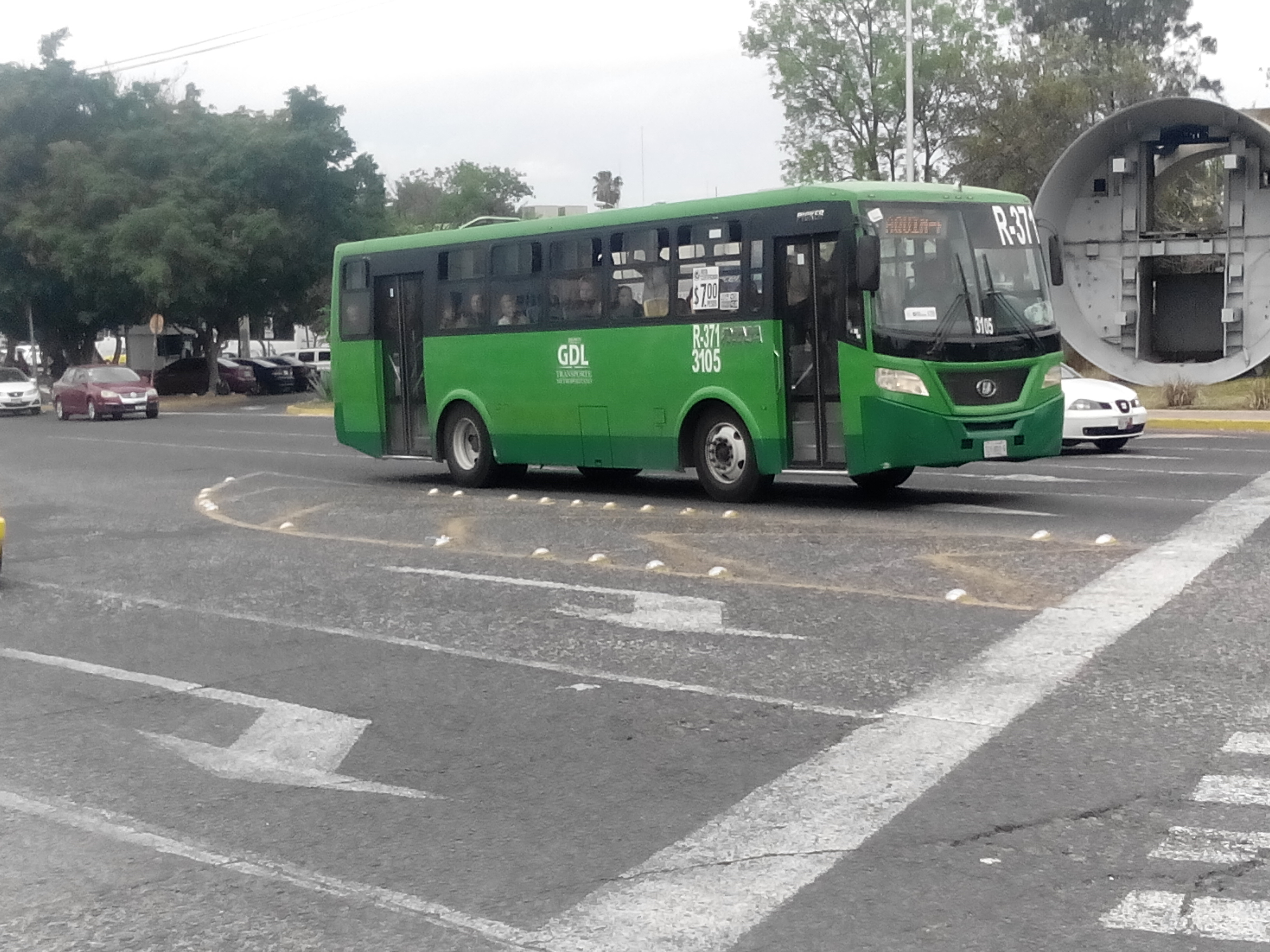 Autobús en la ciudad de Guadalajara, México